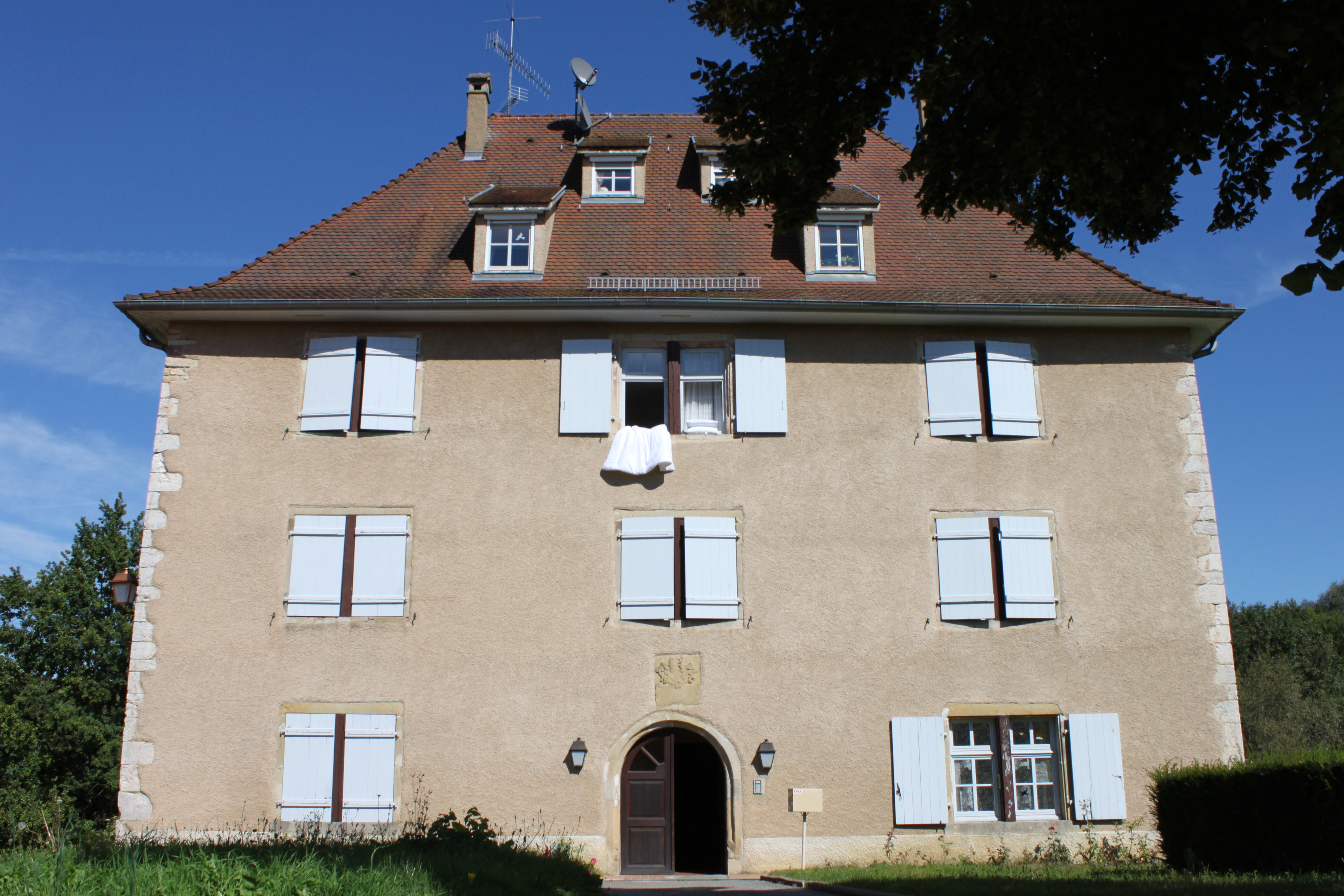 Ancien manoir de Flaxlanden